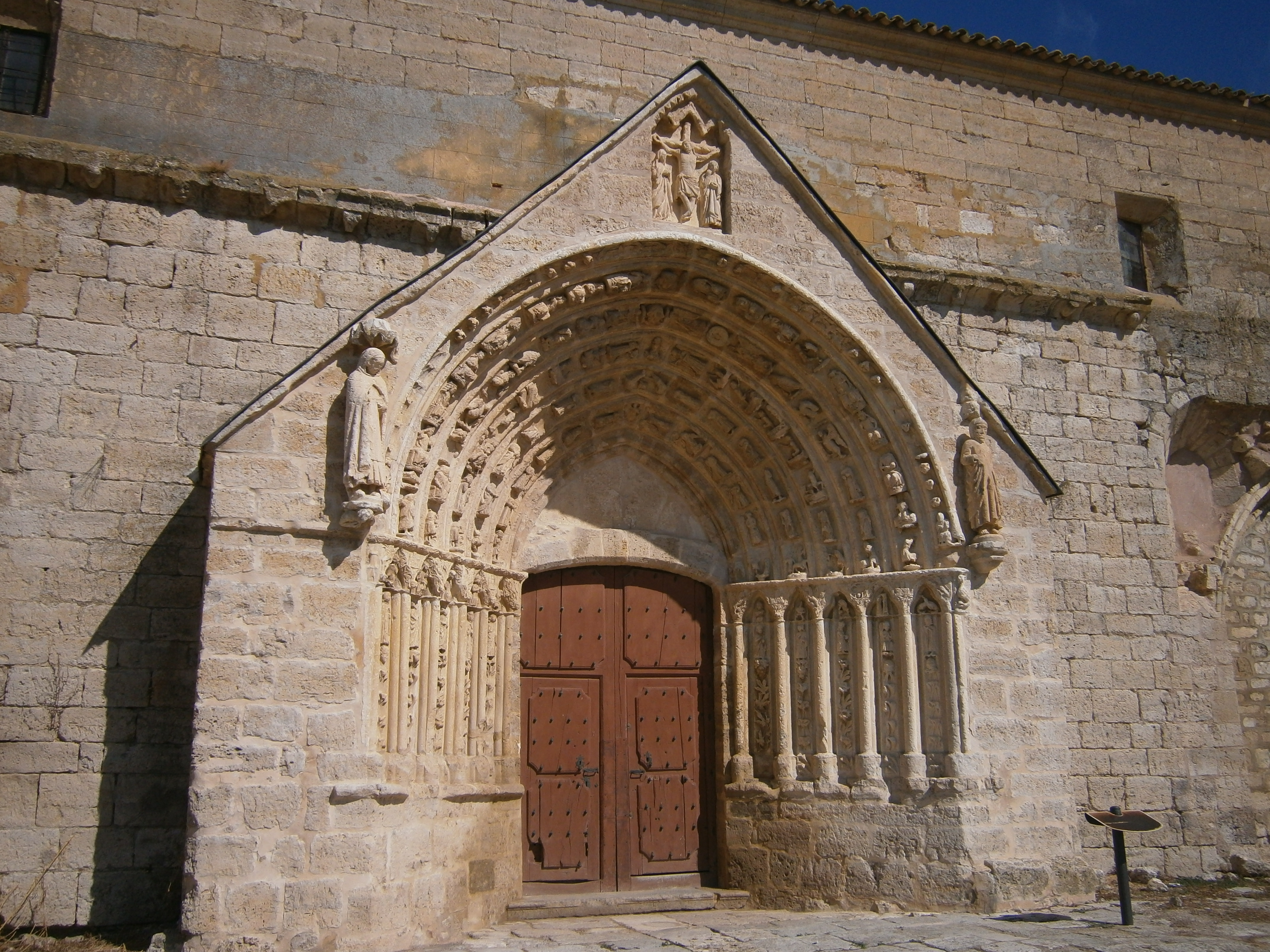 Iglesia de San Millán. Los Balbases, provincia de Burgos (España)